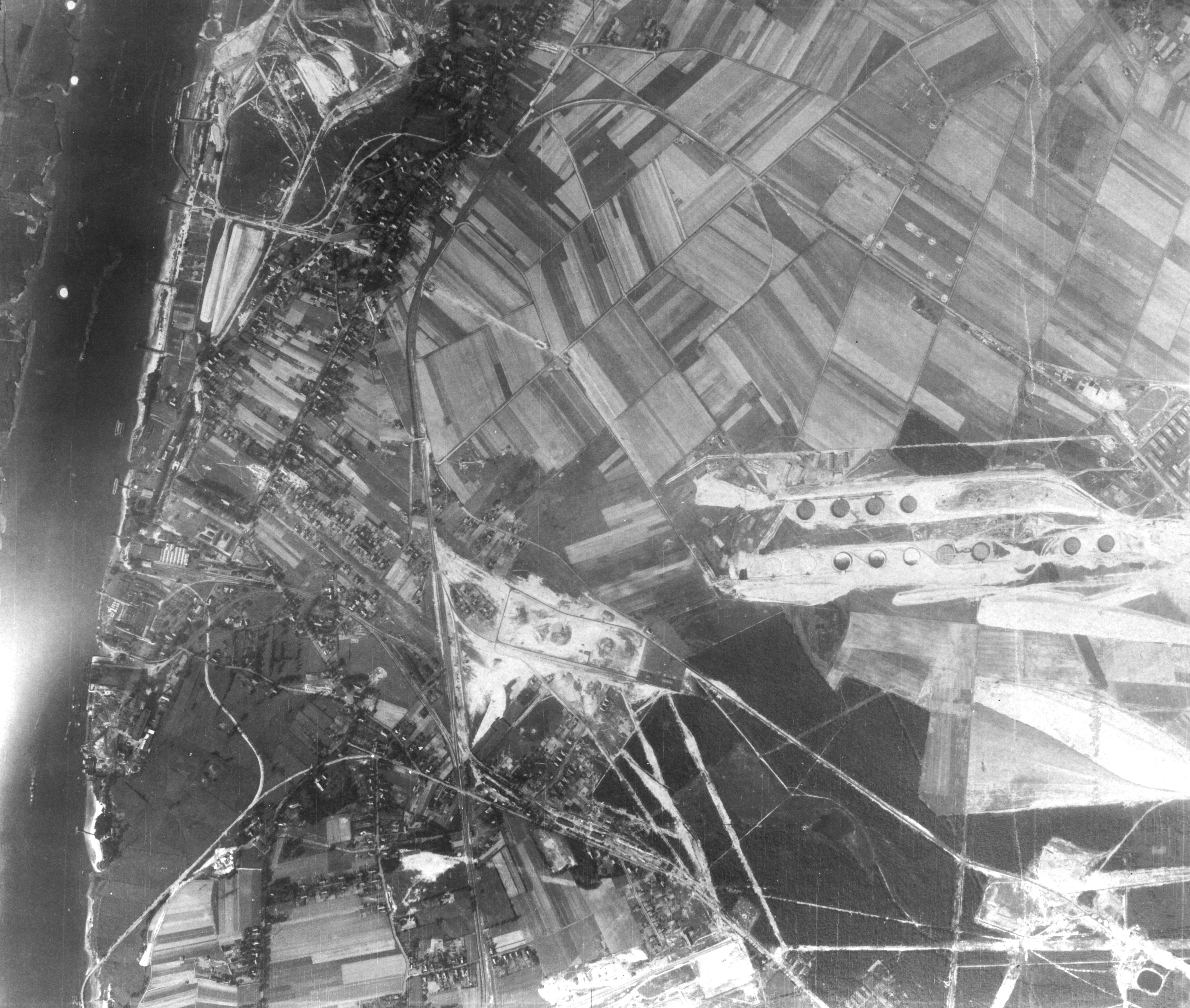 Bremen-Farge, alliierte Luftaufklärung September 1943